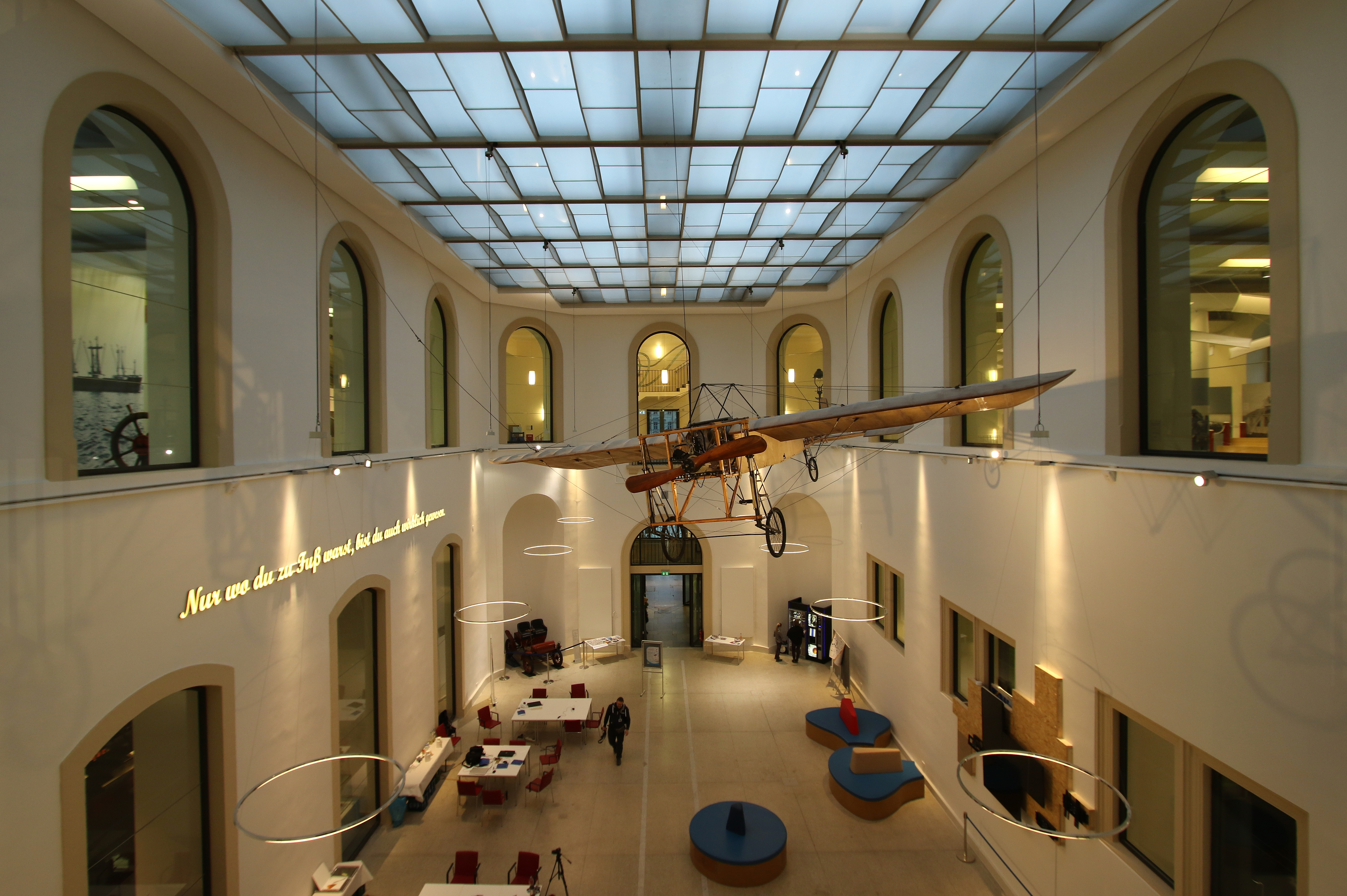 Verkersmuseum Dresden (Innen)..